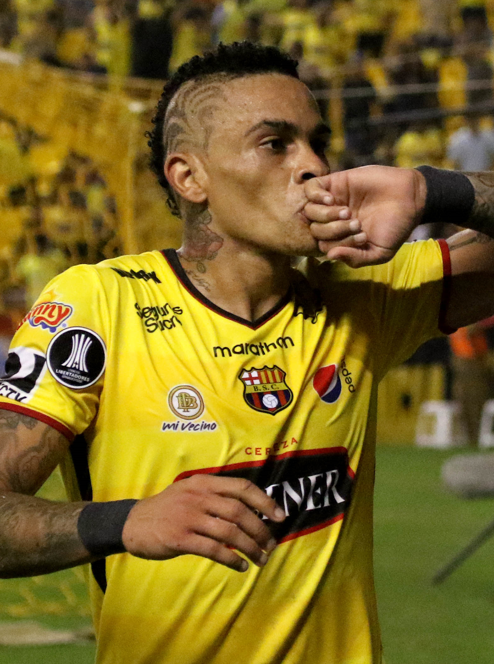 Jonathan Álvez con el Barcelona